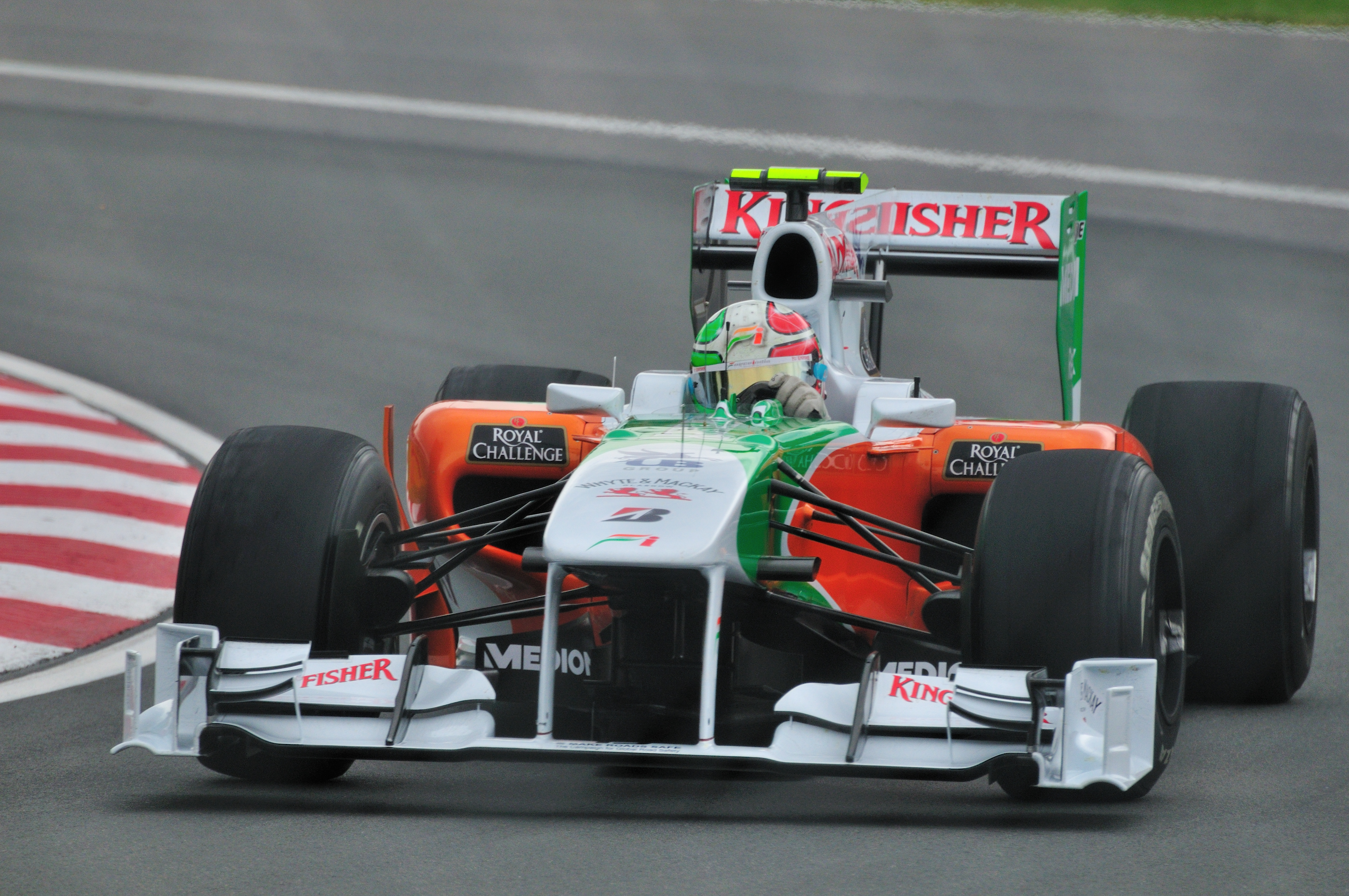 Force India driver Vitantonio Liuzzi's VJM03 in the Senna corner (2010 Montreal GP)